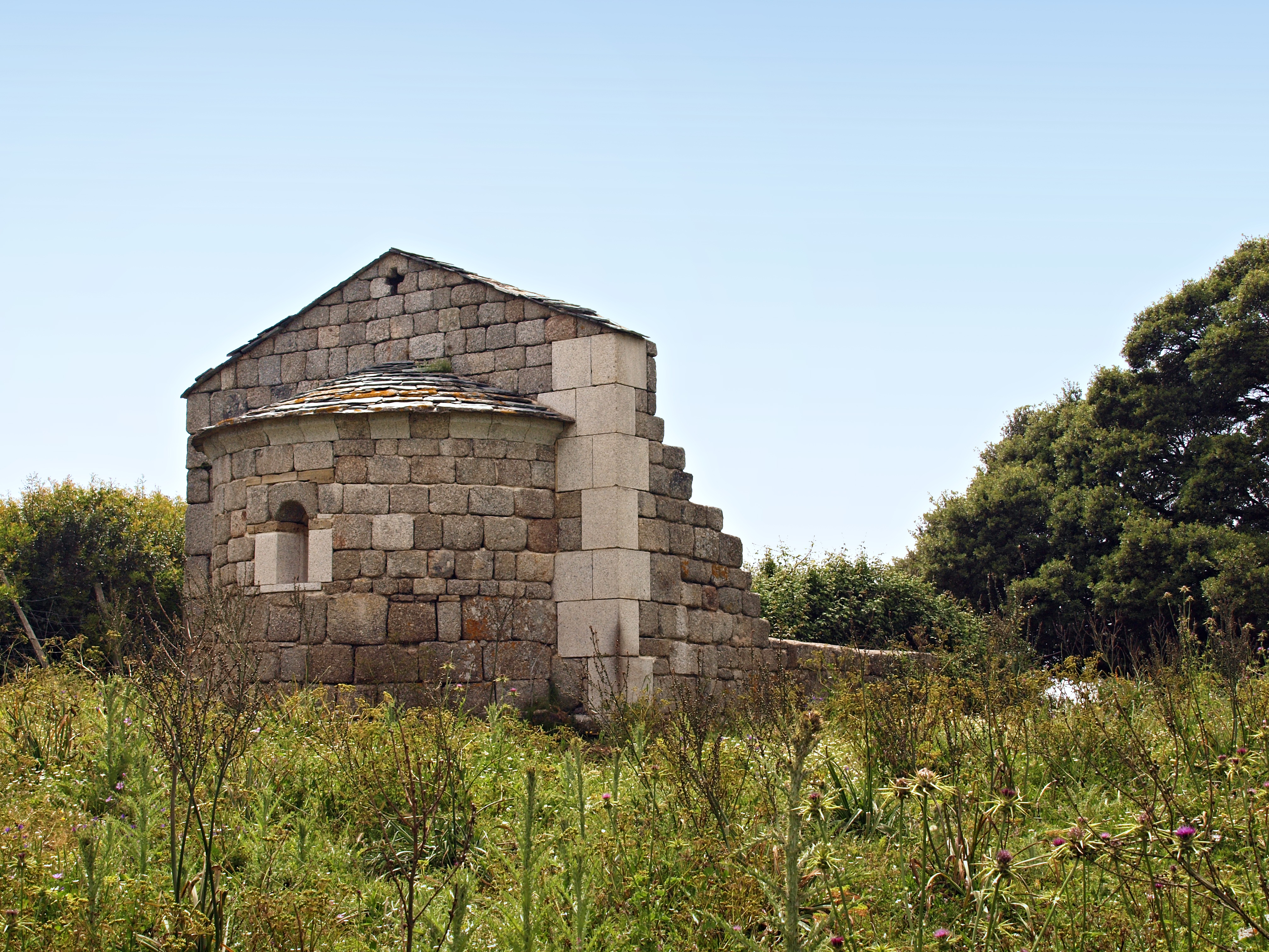 Cargèse, Ouest Corse (Corse) - L'ancienne église Saint-Élie ruinée, située au lieu-dit Campomoro à Paomia